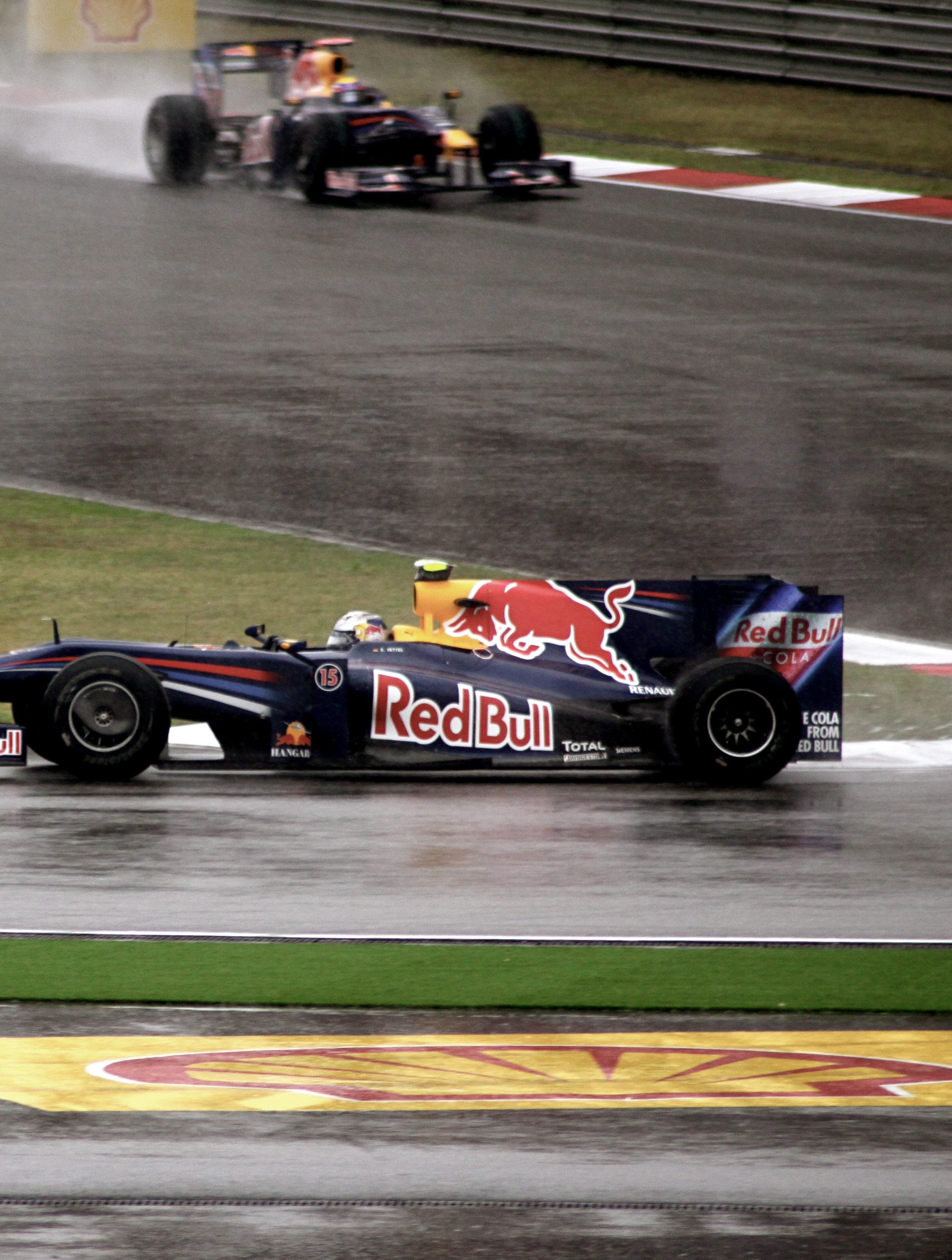 Vettel & Webber. Red Bull Racing. China 09